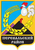 Герб Перевальського району